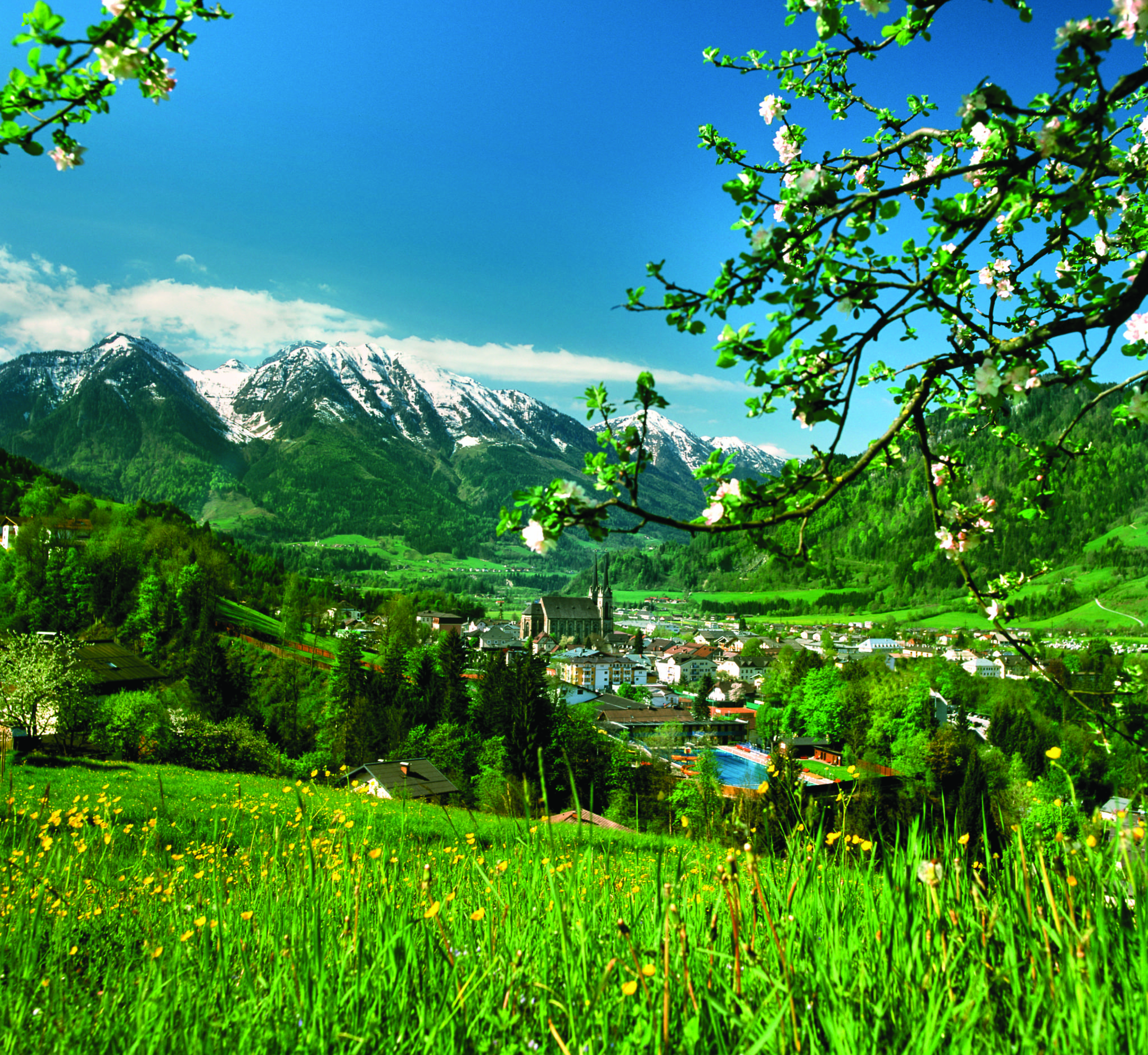 Ansicht von St. Johann